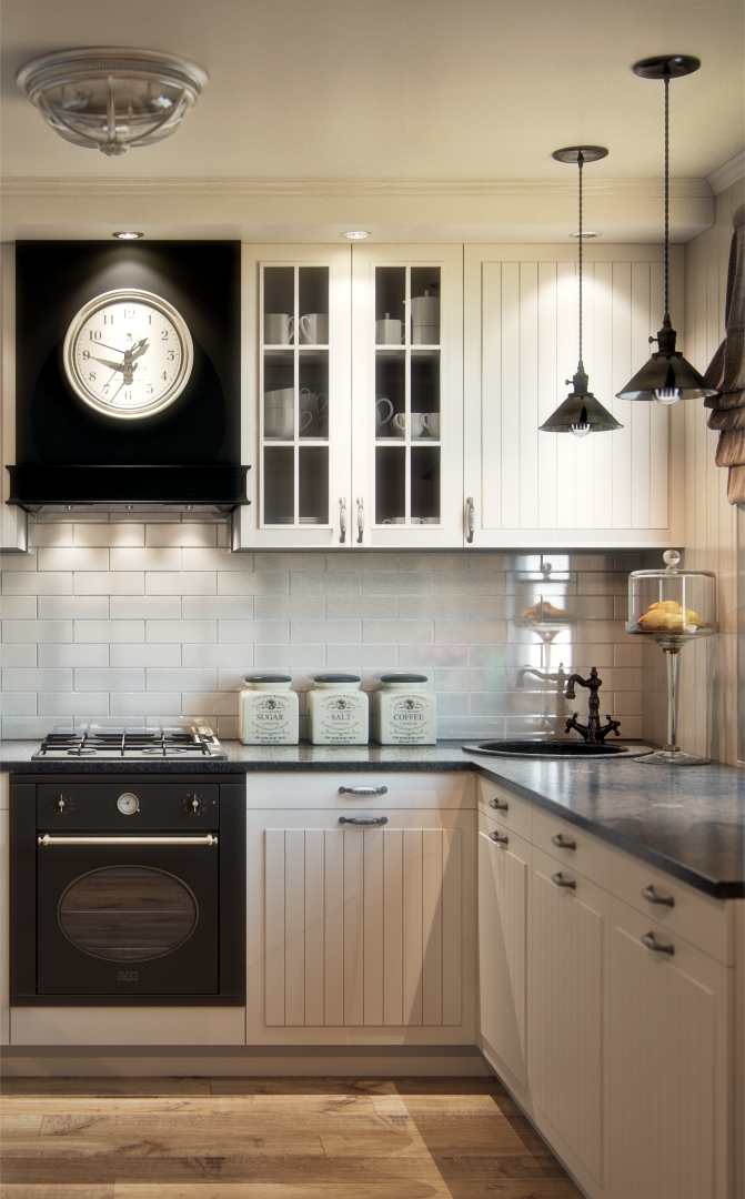 Пример 3D визуализации интерьера